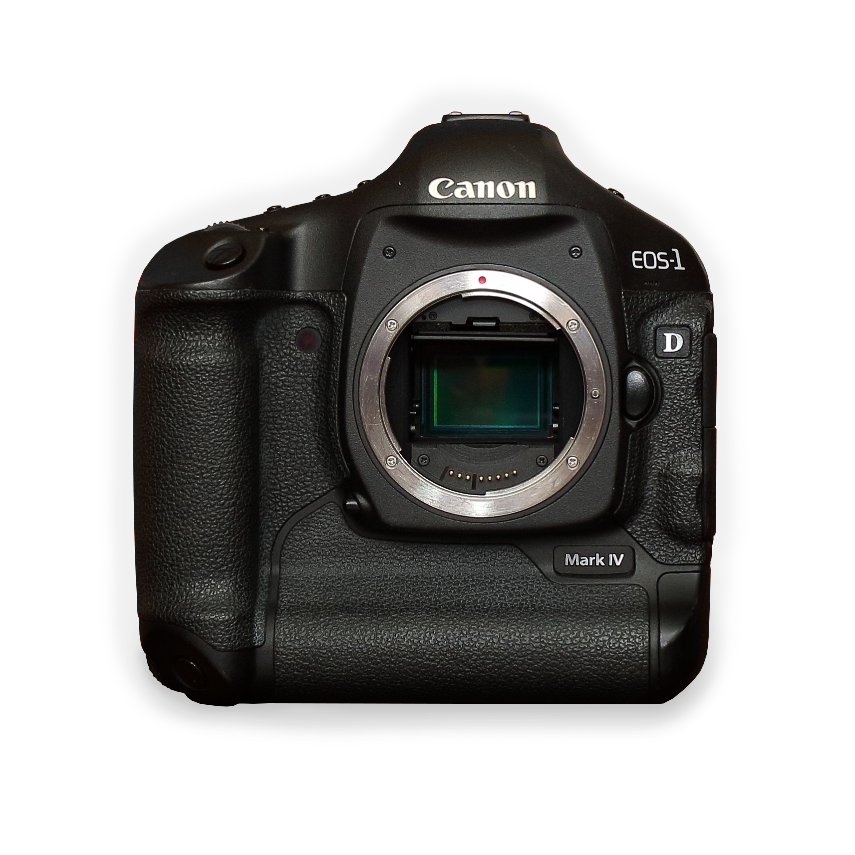 CANON EOS-1D MarkⅣ APS-H DSLR CAMERA